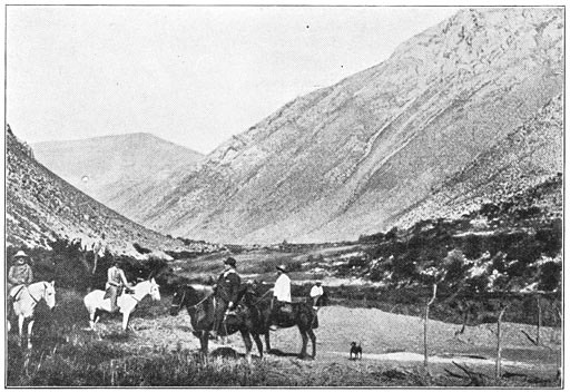 De Elqui-vallei in Coquimbo / Valle del Elqui, Región de Coquimbo. Kijkjes in een mooi werk over Chili. De Aarde en haar Volken, 1906